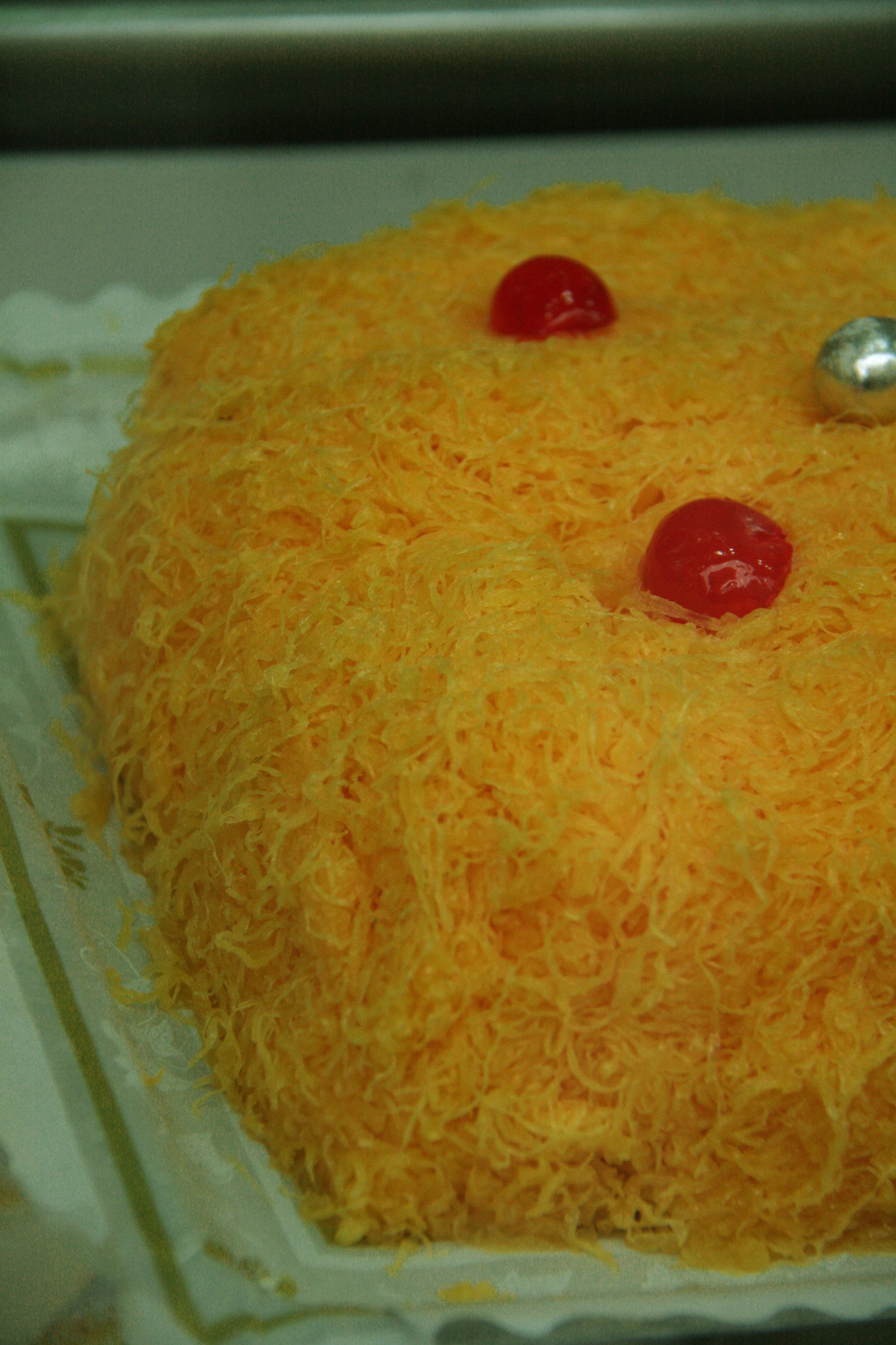 Huevo hilado - Presentación de pastelería